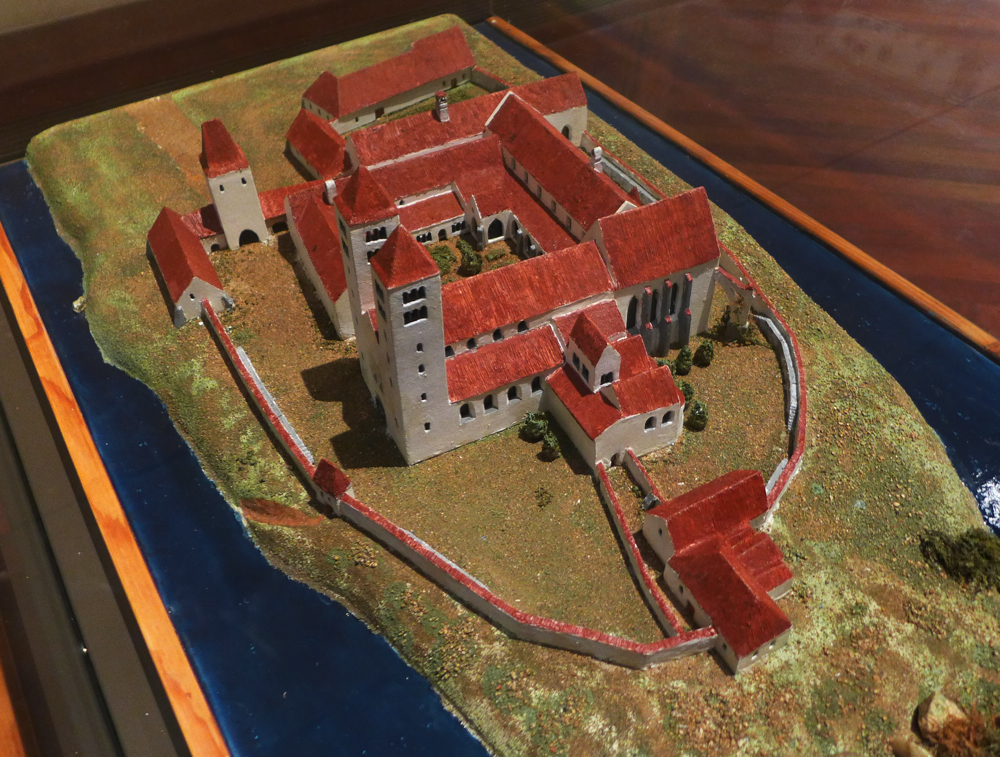 Klášter Ostrov u Davle - model